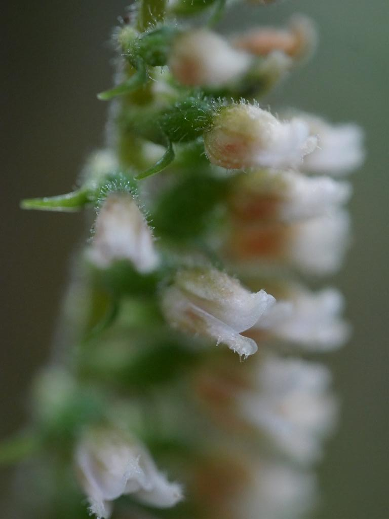 2018/08/15 和歌山県：Wakayama Pref. Japan